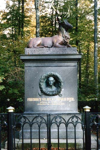 Beschreibung: Pfeildenkmal beim Dammbachhaus zwischen Thale und Treseburg Quelle: selbst fotografiert, Okt. 2002 Fotograf: Hejkal